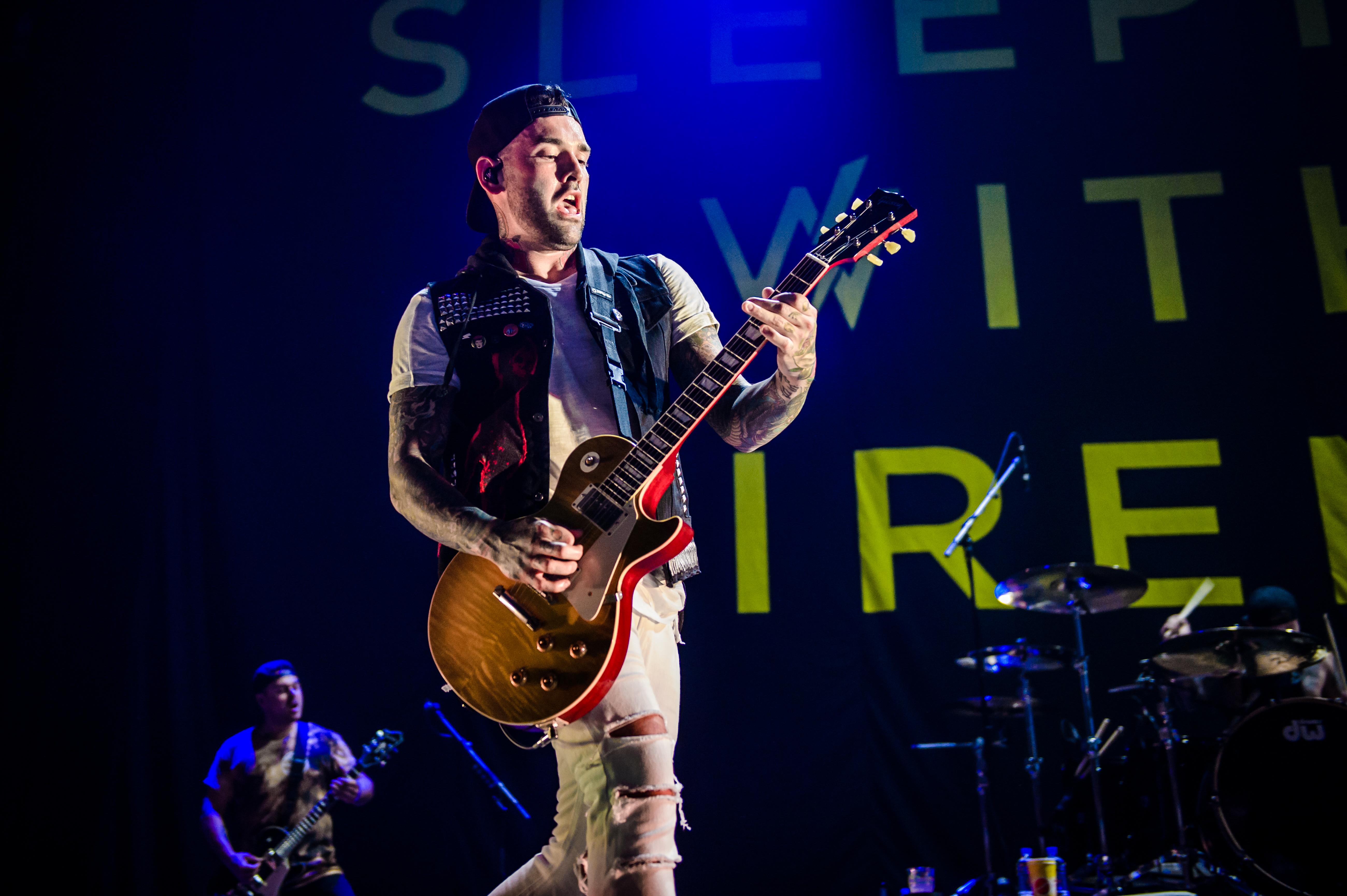 'Rock im Park 2017; Nürnberg': 'Sleeping With Sirens'